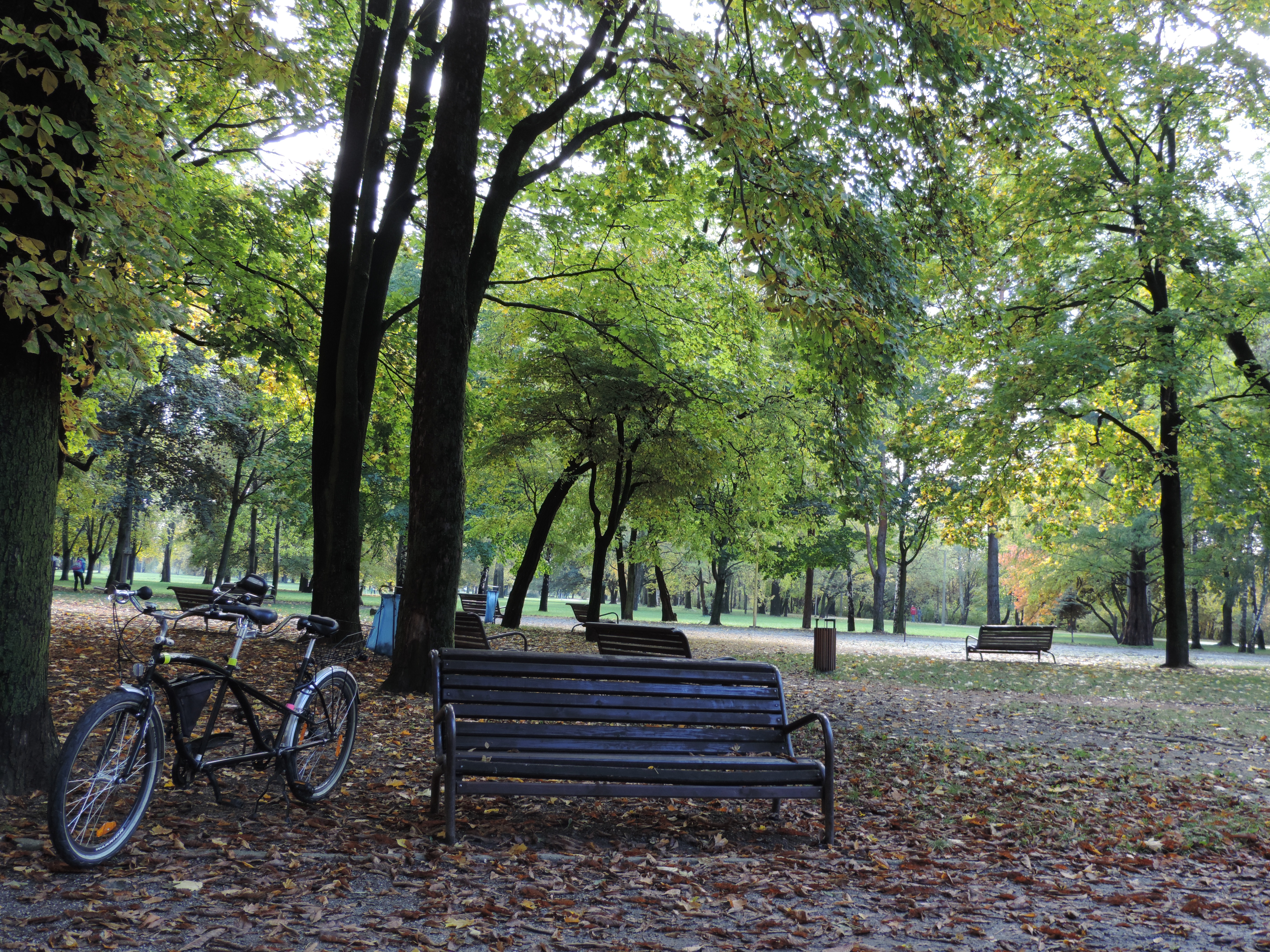 Jesenný park Anička